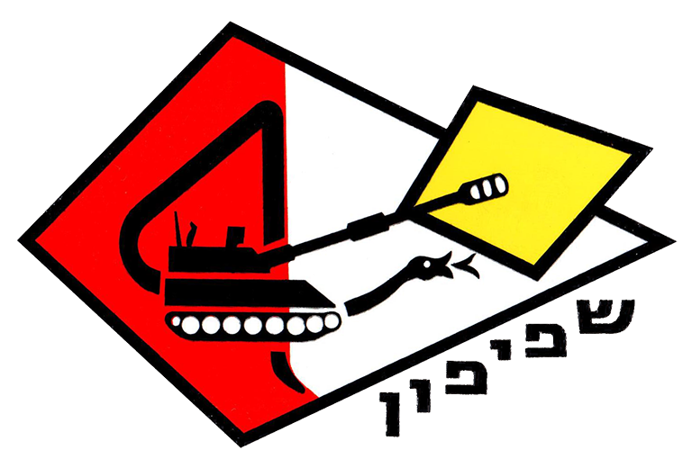 סמל גדוד שפיפון